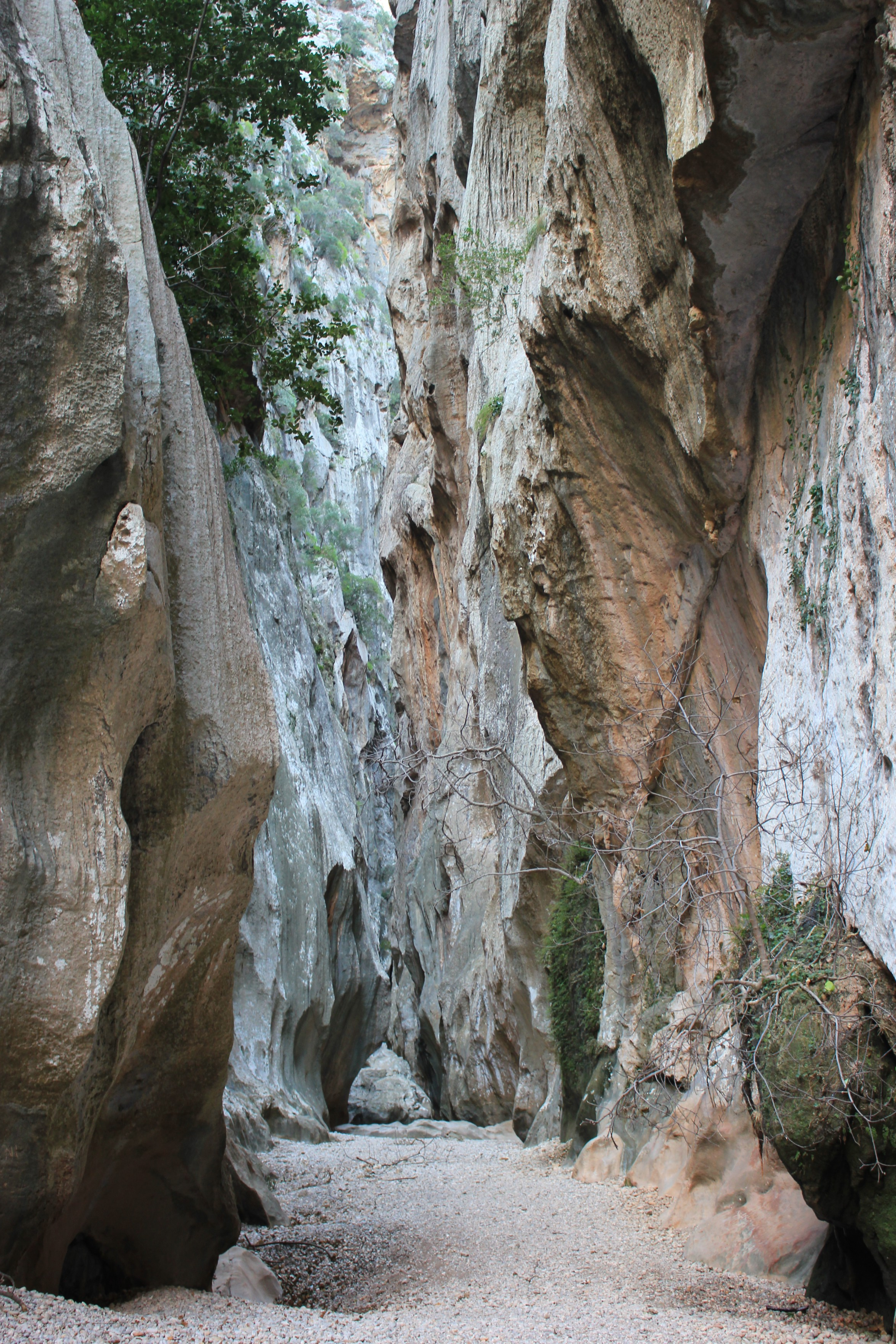 An der engsten Stelle des Torrent de Pareis, dem "Höllenloch".